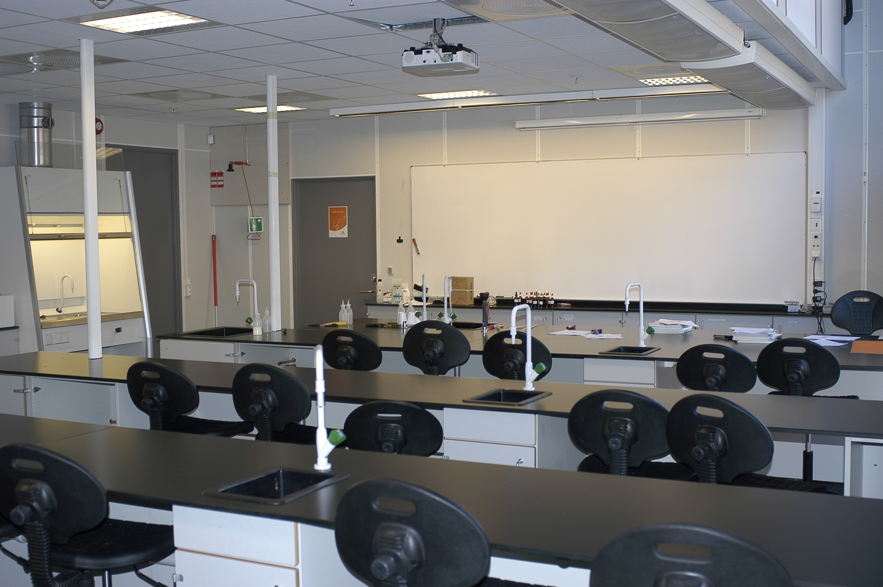 Kjemilaboratoriet på Akademiet.